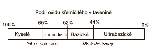 Procentuální zastoupení oxidu křemičitého v hornině a určování viskozity vlivem rostoucího zastoupení.